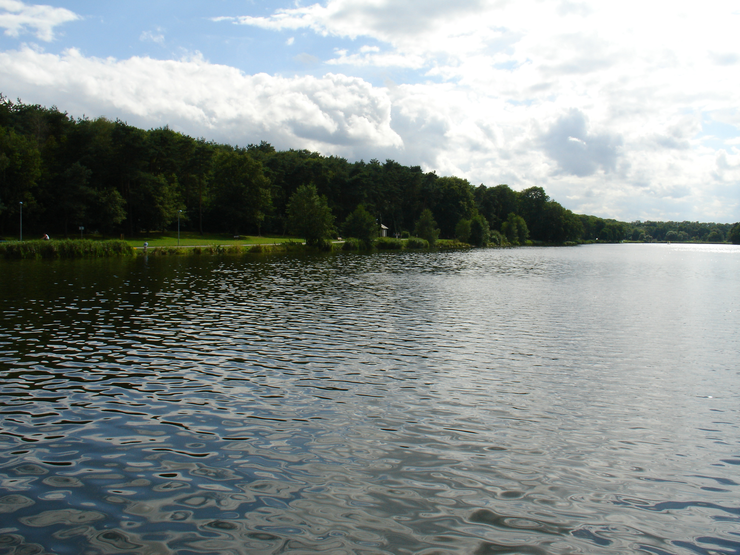 Le lac de Creutzwald.